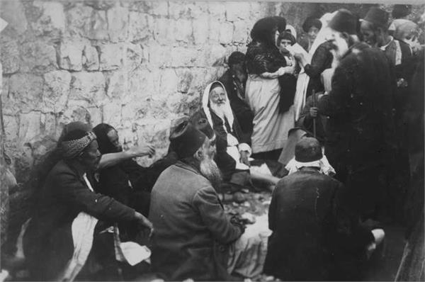 ירושלים - טיפוסים שונים בחגיגה ע"י קברו של שמעון הצדיק ל"ג בעומר תרפ"ז